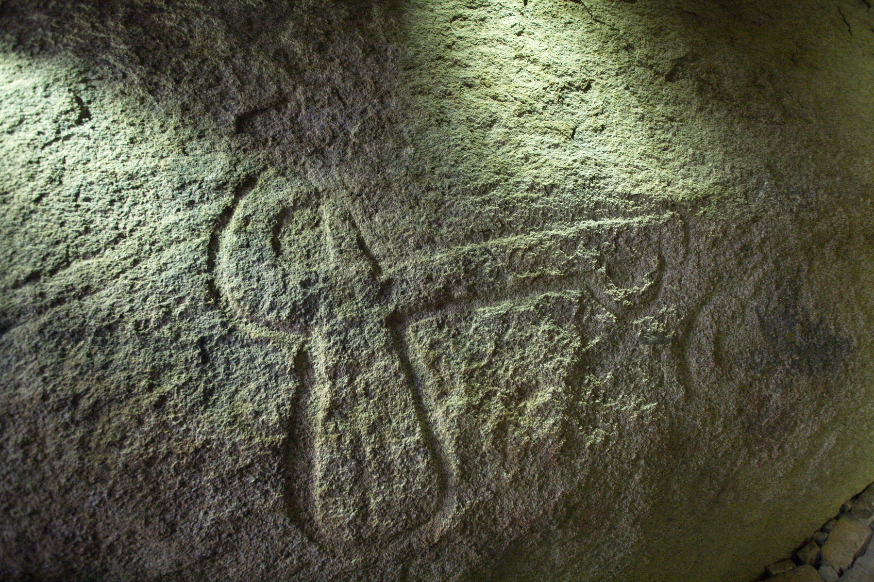 Table des Marchand (Classé) .